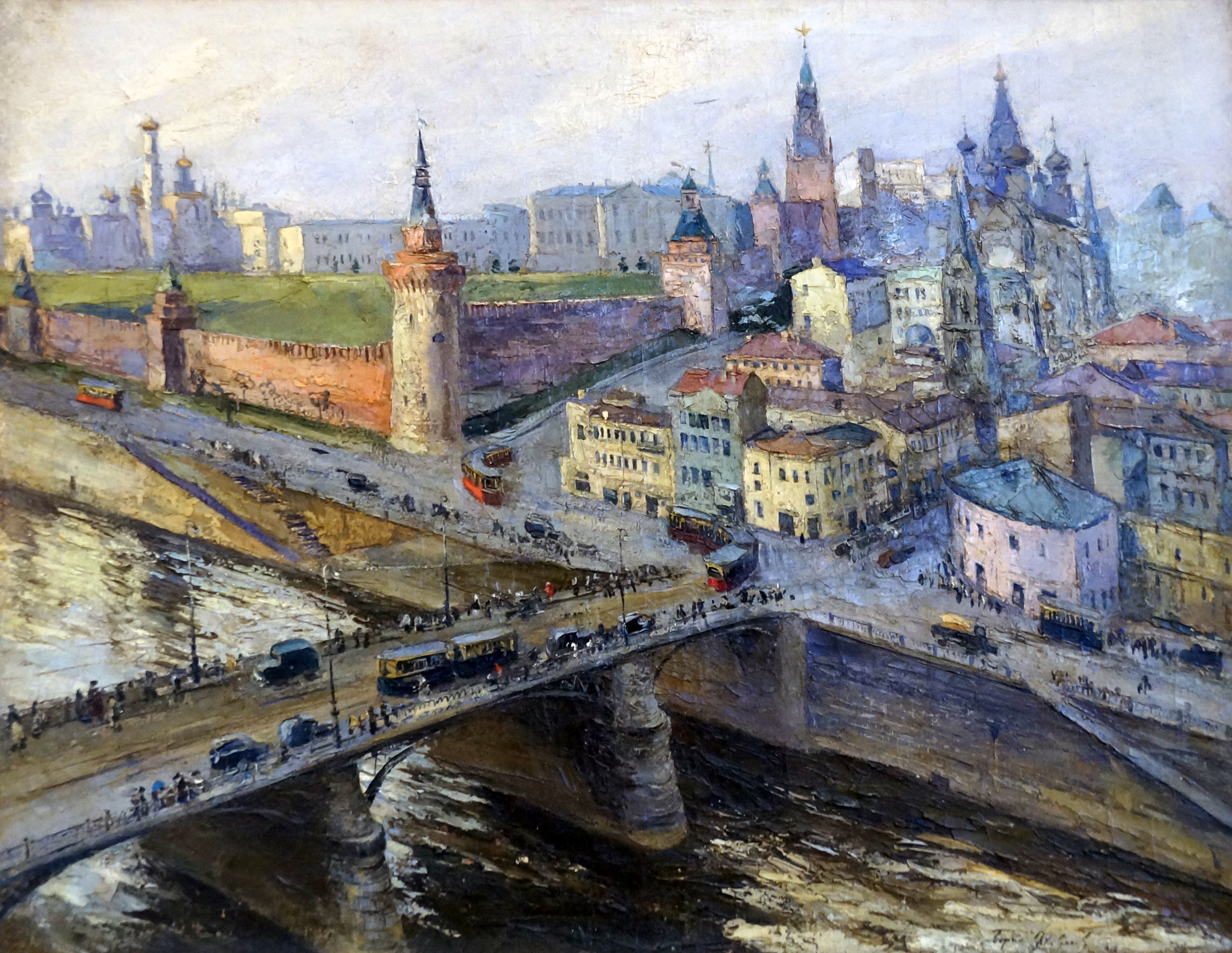 Б.Н.Яковлев. Москва. Вид на Кремль со стороны Москворецкого моста. 1936.